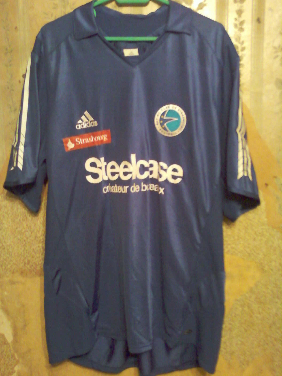 Maillot domicile 2004-2005 du Racing Club de Strasbourg